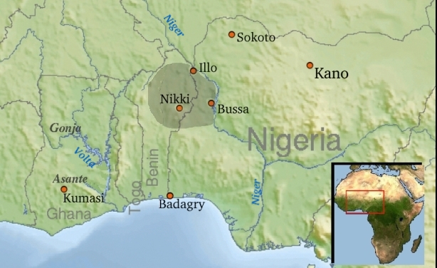 Kaart ligging Borgoe in W-Afrika